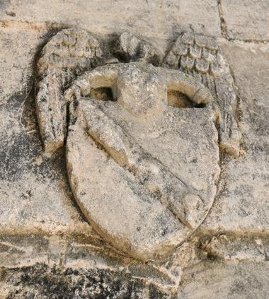 Armoiries de Saint Gabriel en bas-relief au Prieuré Saint Gabriel à Saint-Gabriel-Brecy dans le Calvados. Les ailes de l'archange sont nettement visibles.